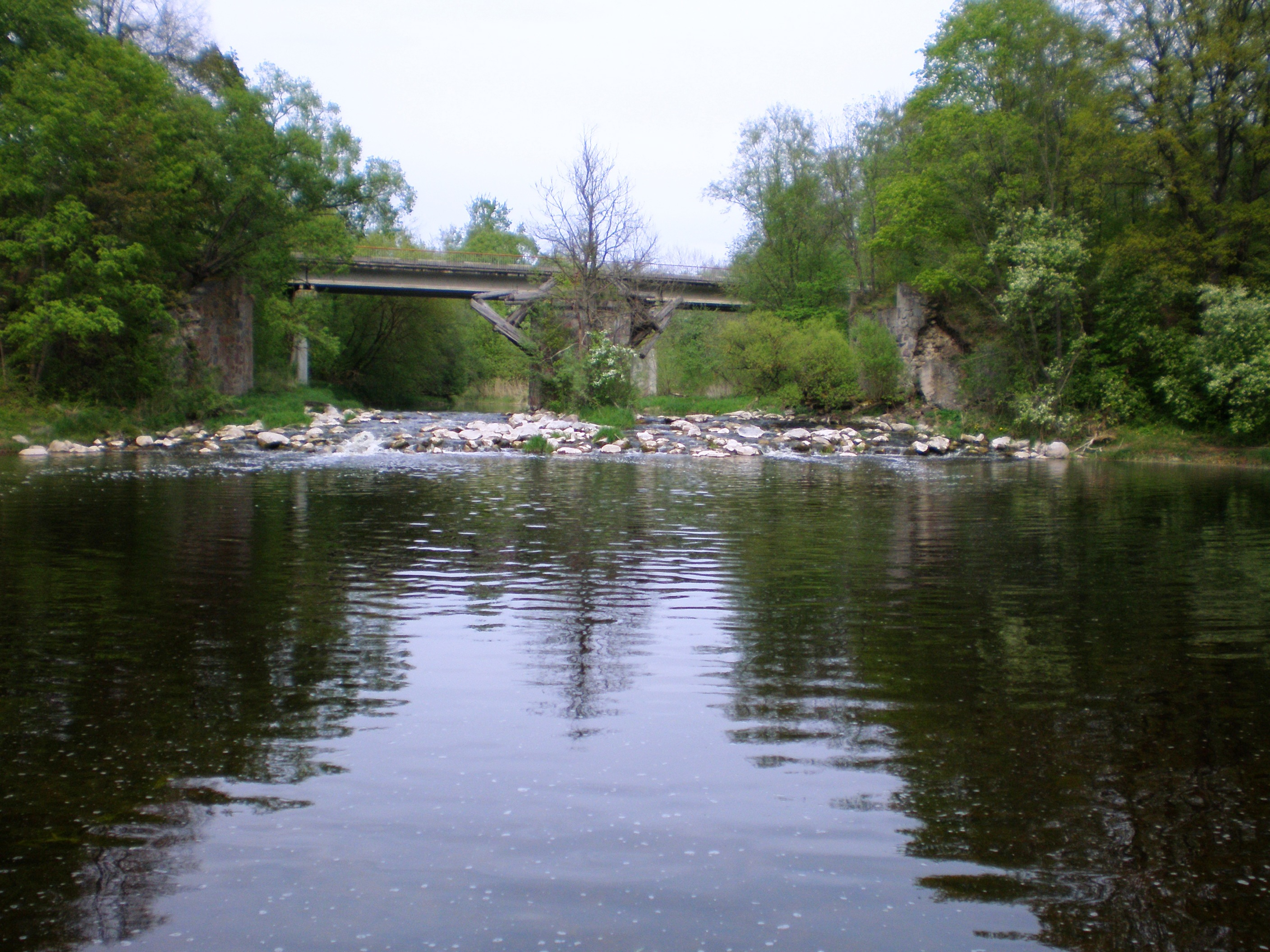 Vandens malūno liekanos Šušvėje ties Pašušviu, Kėdainių raj.